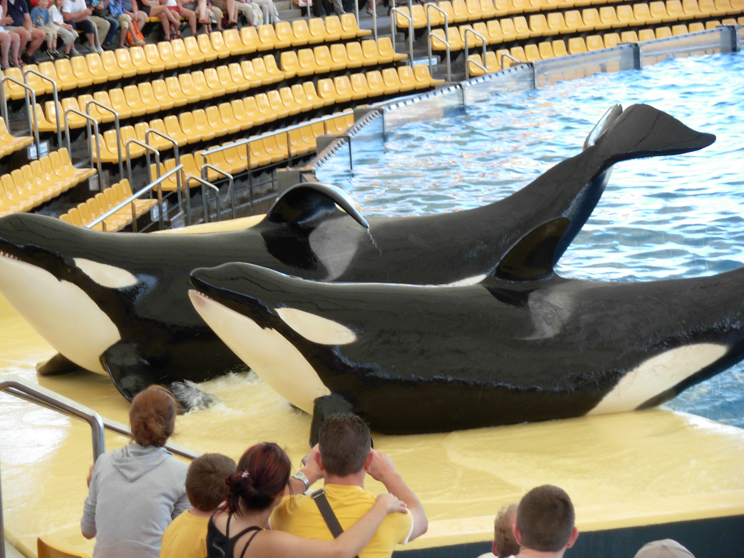 Orcas at Loro Parque.